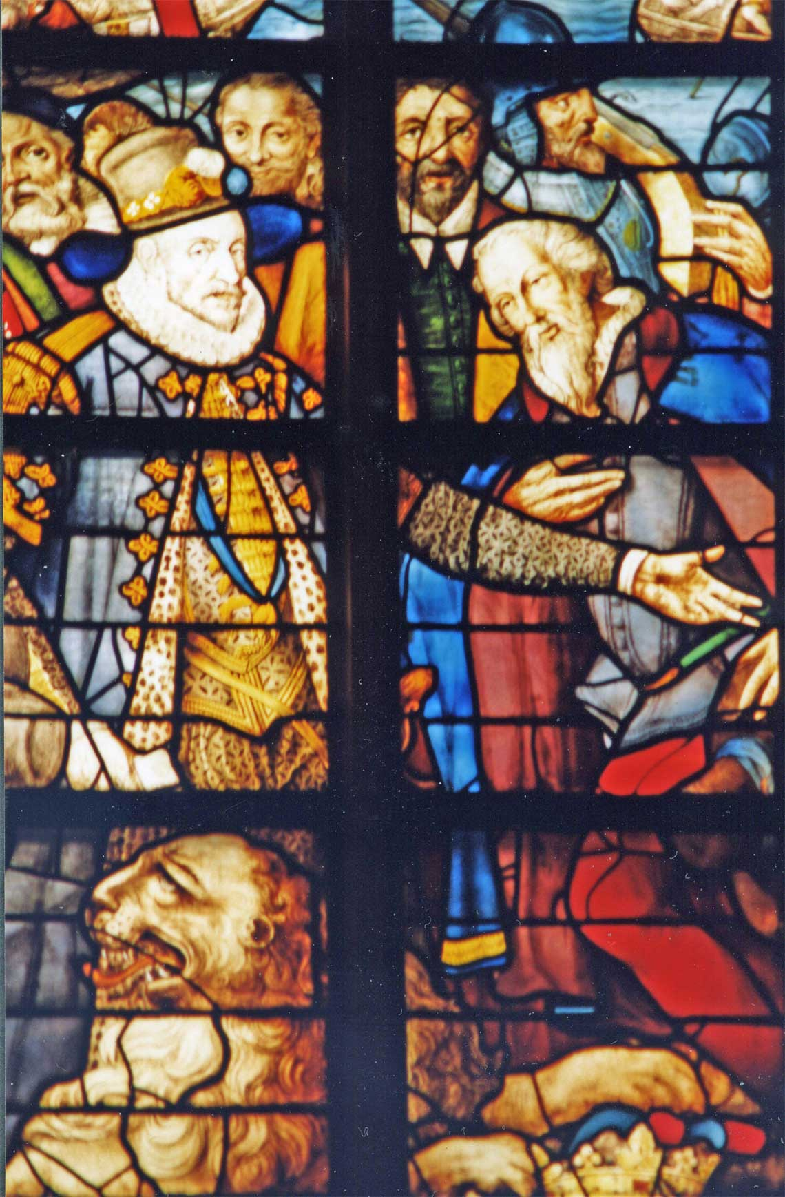 Detail glas 25 St. Janskerk: Het ontzet van Leiden (afbeelding Willem van Oranje); makers Dirck Verheyden en Dirck van Douwe, naar een ontwerp van Ysaac Claesz Swanenburg, 1603